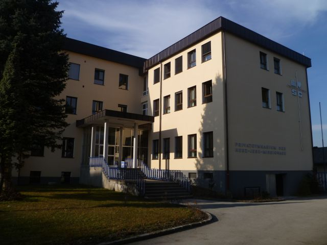 Schloss_Schönleiten-Rest_des_ursprünglichen_Schlosses